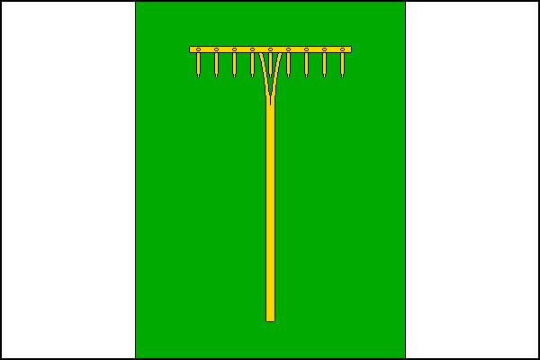 Vlajka obce Ketkovice